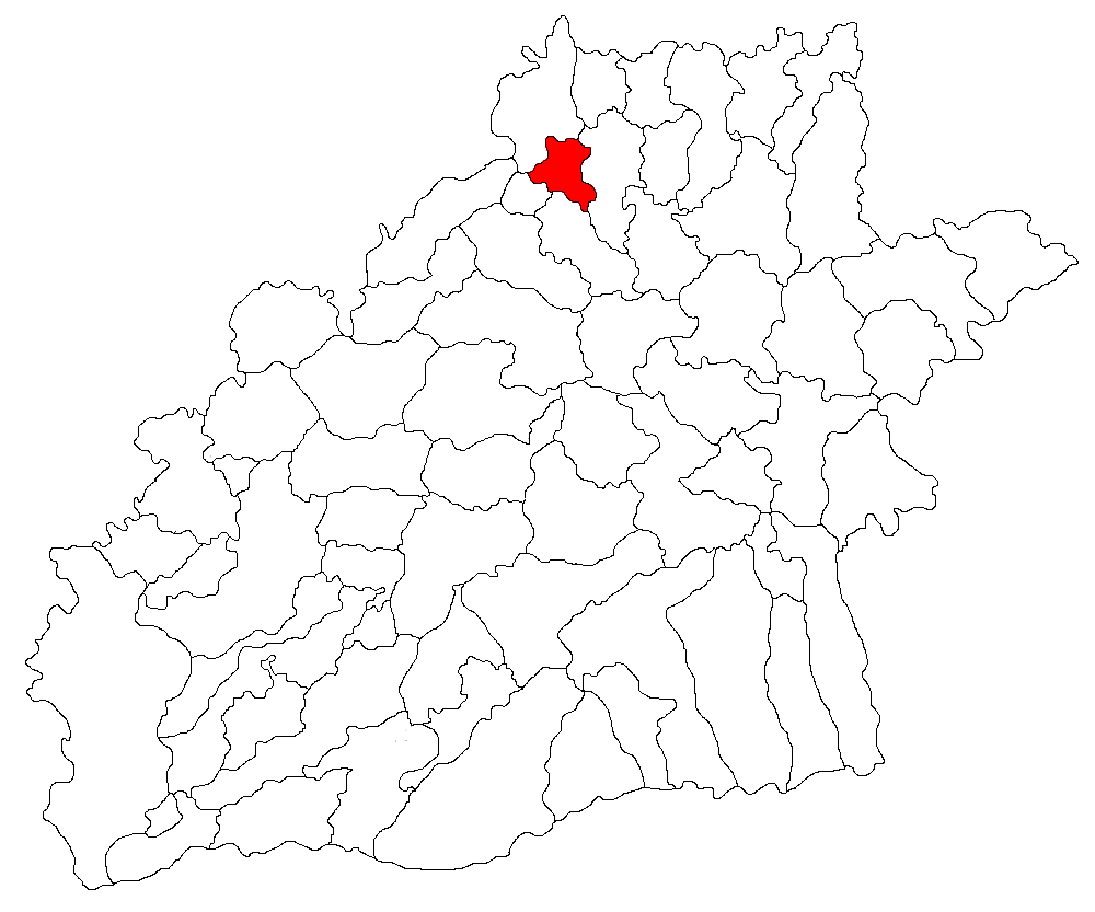 Categorie:Hărţi ale judeţului Sibiu